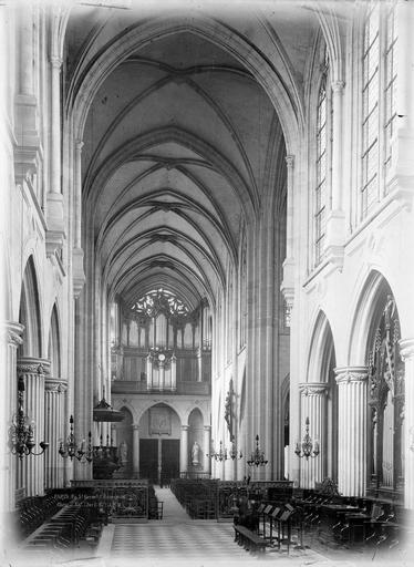 Nef, vue du choeur